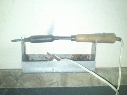 Советский электропаяльник, мощностью 60 Вт на подставке для припоя и канифоли. К сетевому шнуру крепится евровилка